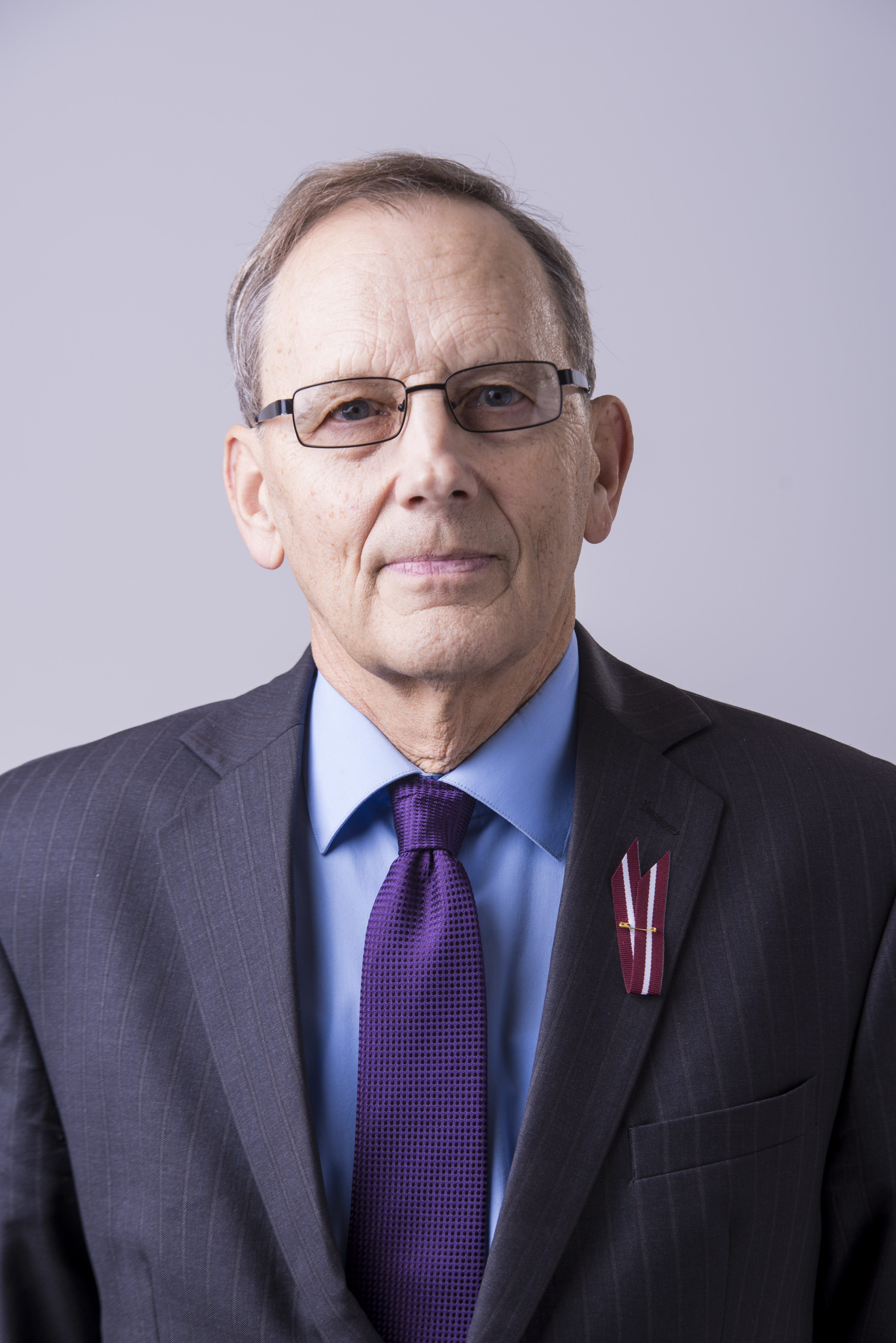 2014.gada 9.decembris. 12.Saeimas deputāts Aleksandrs Kiršteins. Foto: Reinis Inkēns, Saeimas Kanceleja Izmantošanas noteikumi: saeima.lv/lv/autortiesibas